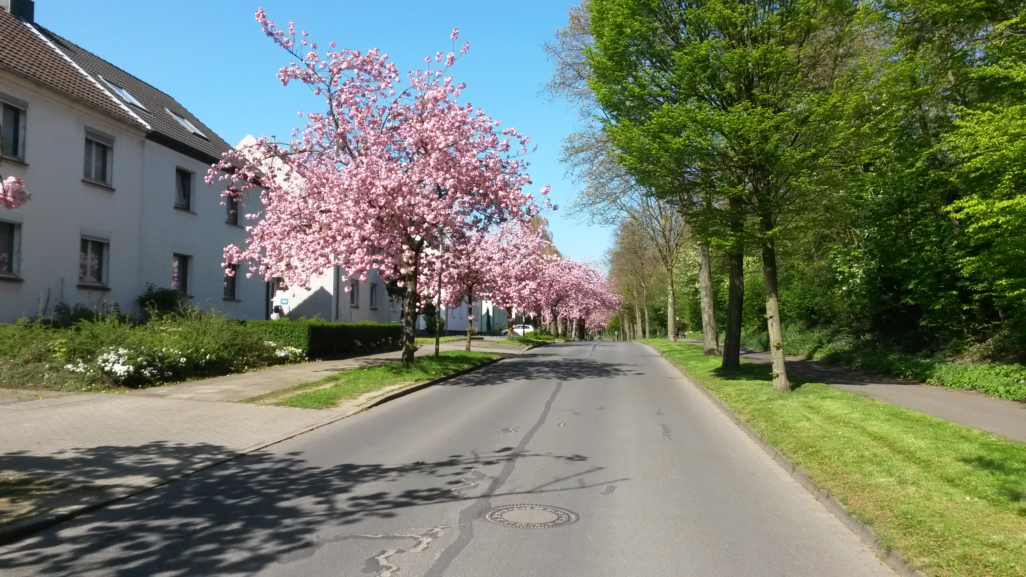 Die Hiberniastraße in Alstaden (Oberhausen, NRW); zwischen Kreuzungen Rehmer und Landwehr